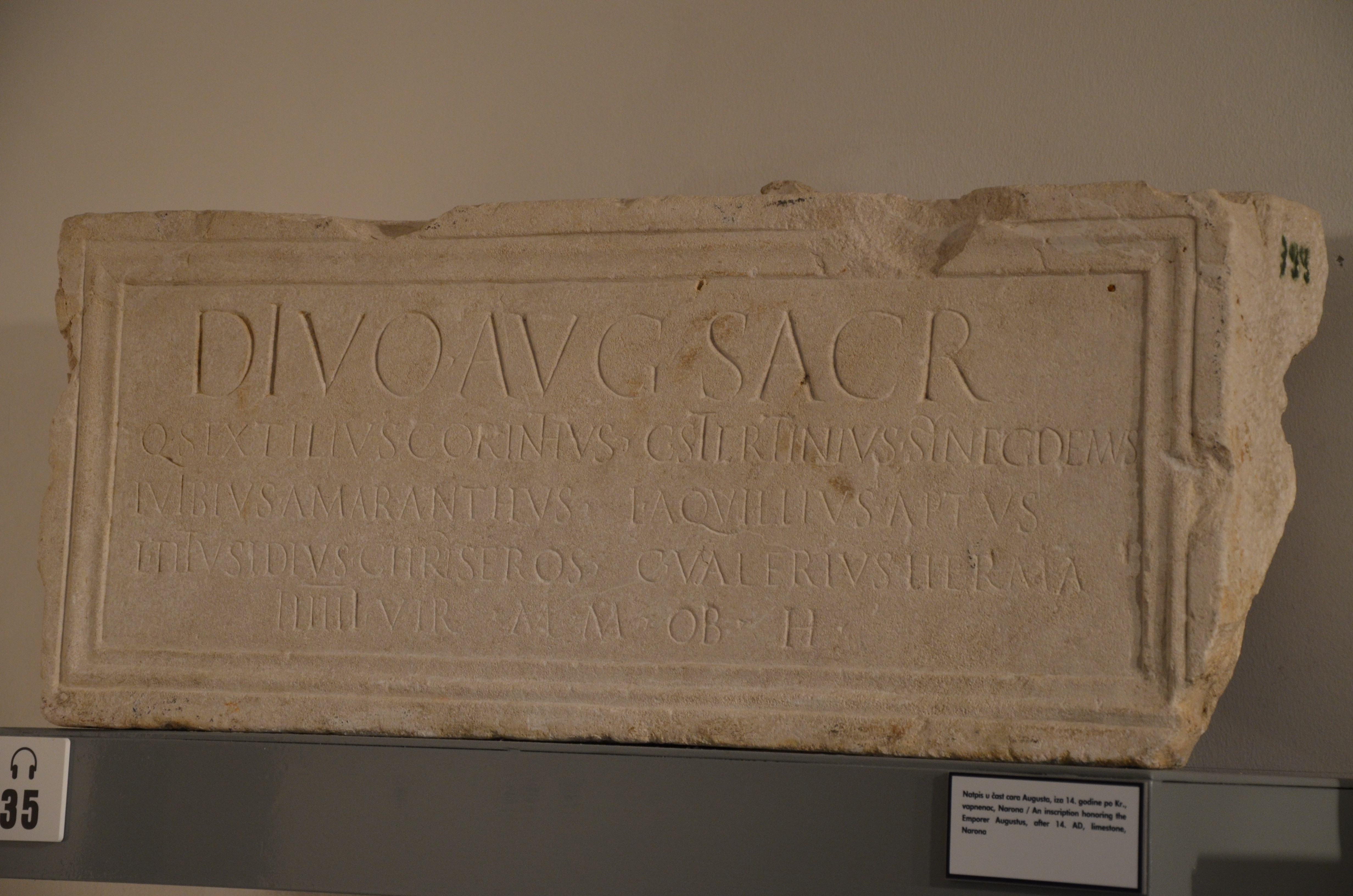 Archaeological museum Narona, Vid, Croatia. CIL III 1770: Divo Aug(usto) sacr(um) / Q(uintus) Sextilius Corinthus / C(aius) Stertinius Synegdemus / L(ucius) Vibius Amaranthus / L(ucius) Aquillius Aptus / L(ucius) Titusidius Chryseros / C(aius) Valerius Herma / IIIIIIvir(i) m(agistri) M(ercuriales) ob h(onorem)